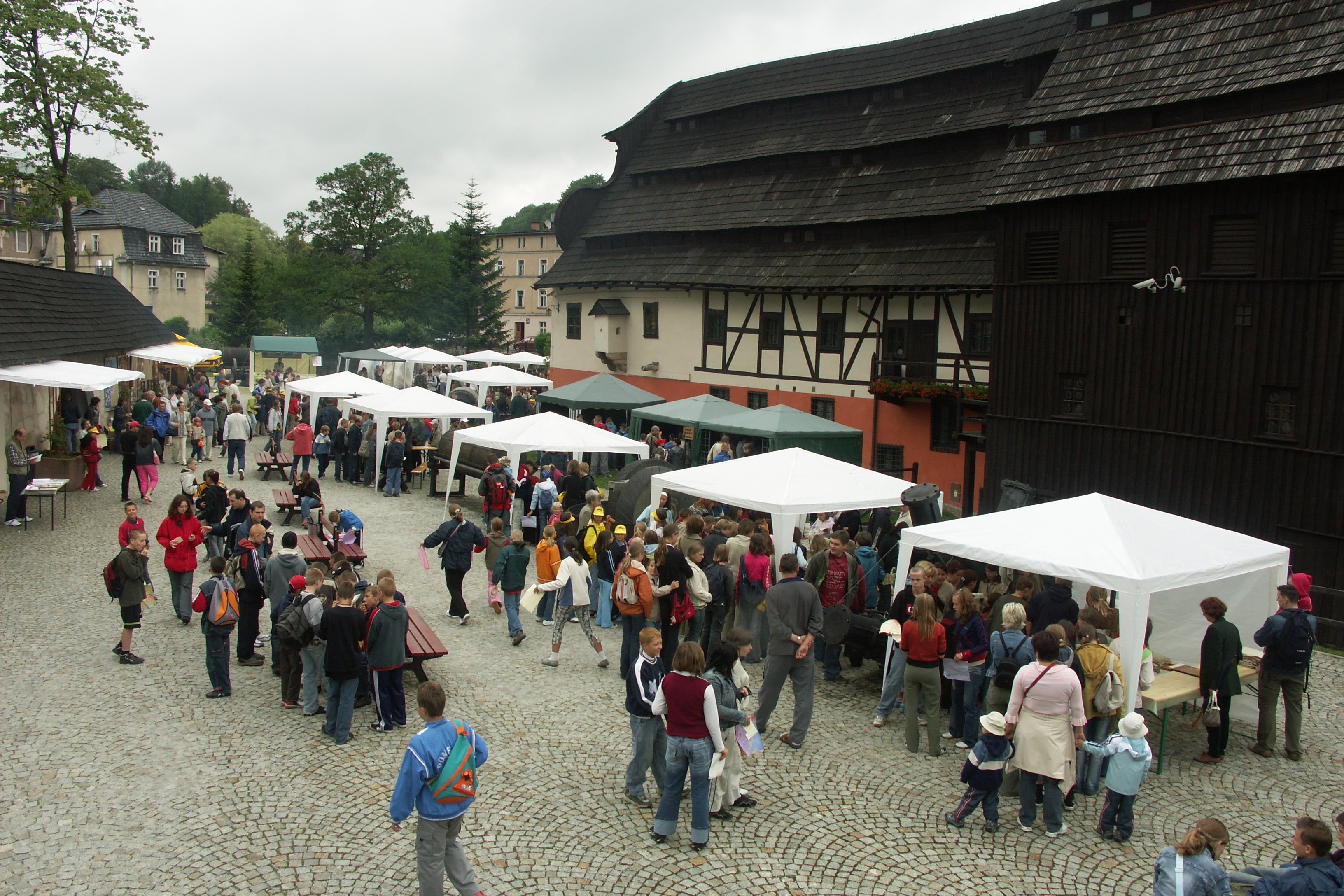 Muzeum Papiernictwa w Dusznikach-Zdroju – festyn z okazji Święta Papieru.